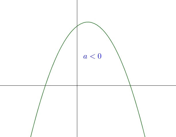 Mostra uma função quadrática com concavidade para baixo